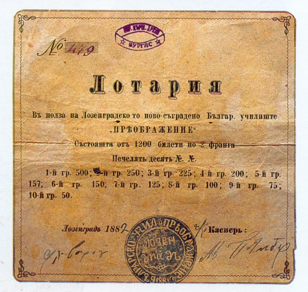 Билет от лотария в полза на новопостроеното българско училище "Преображение" в Лозенград, 1882